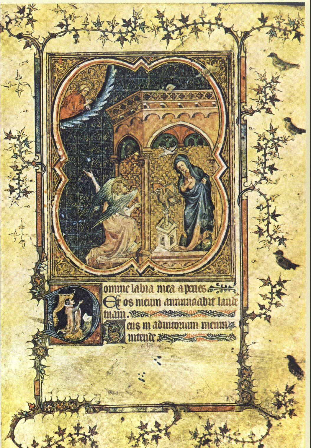 Miniature Annunciation